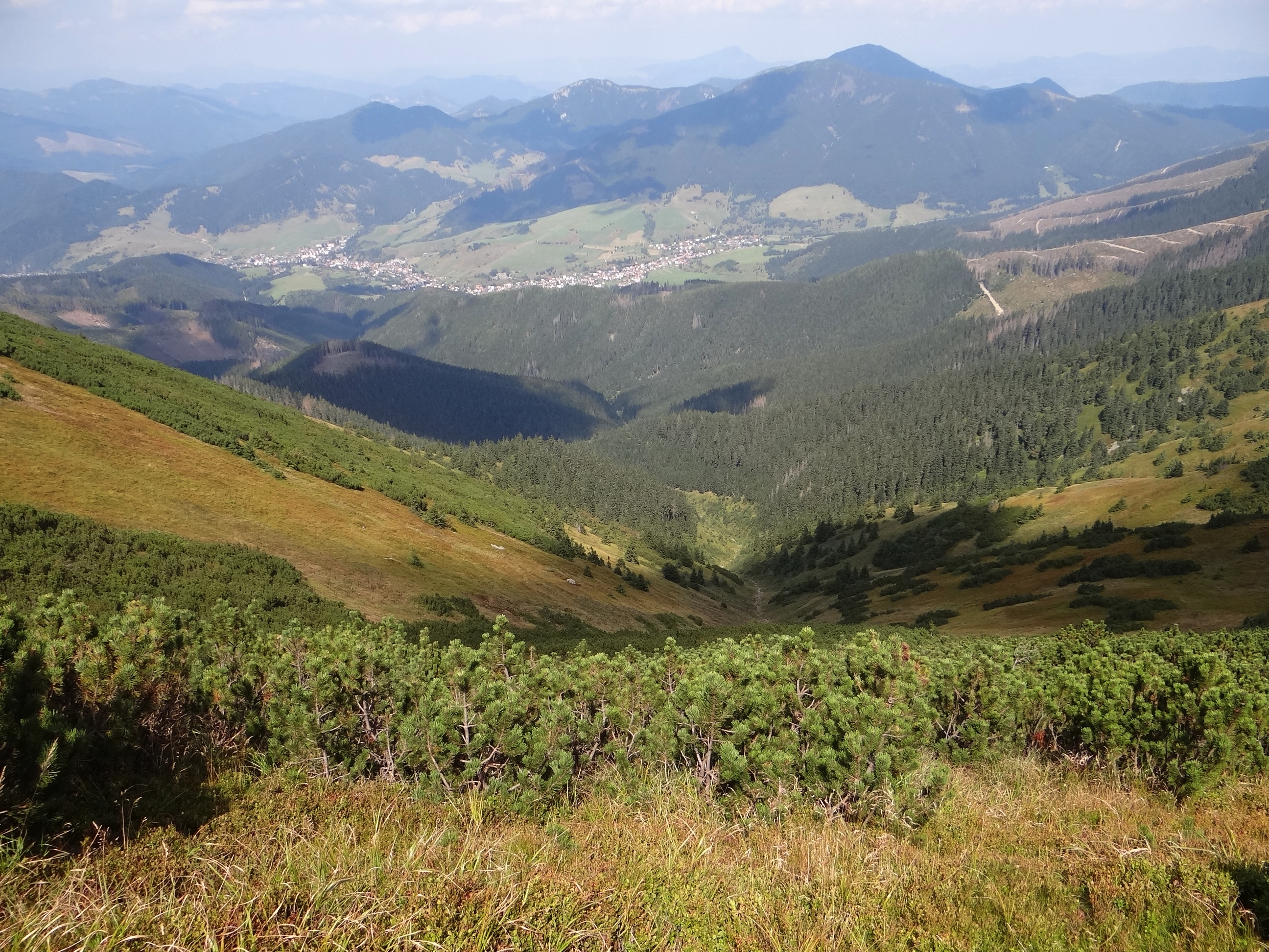 Dolina Banské pod szczytem Košarisko w Niżnych Tatrach